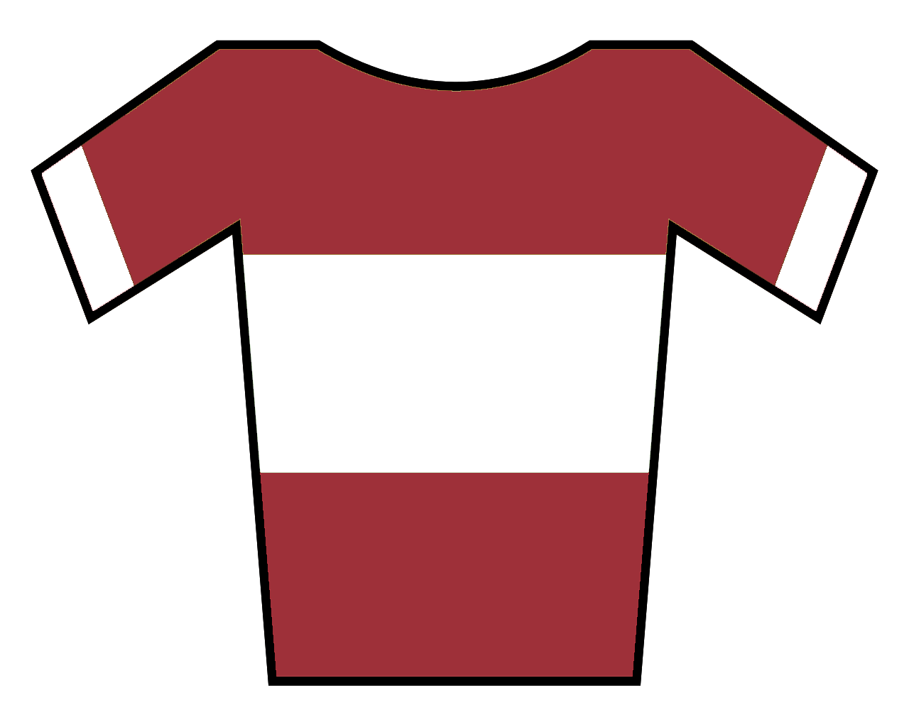 Maillot de Letonia